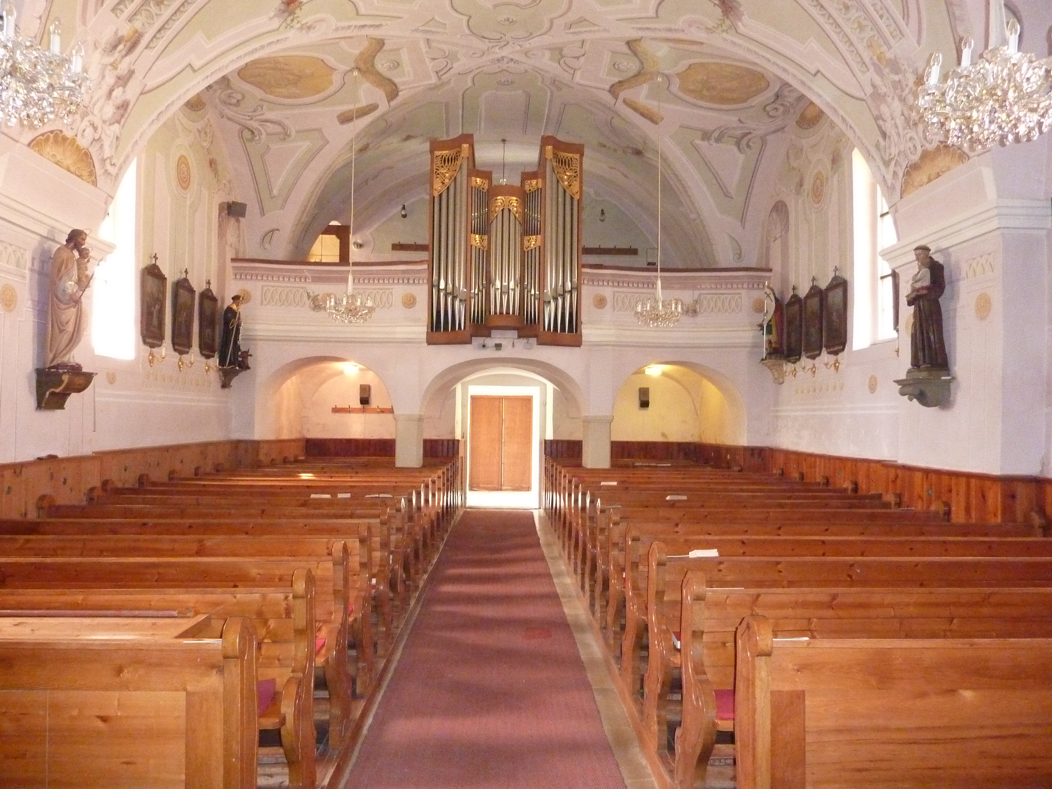 Pfarrkirche Haindorf, Markersdorf-Haindorf, Niederösterreich – Orgel von Gregor Hradetzky 1978; Wand- und Deckenmalerei von Andreas Rudroff